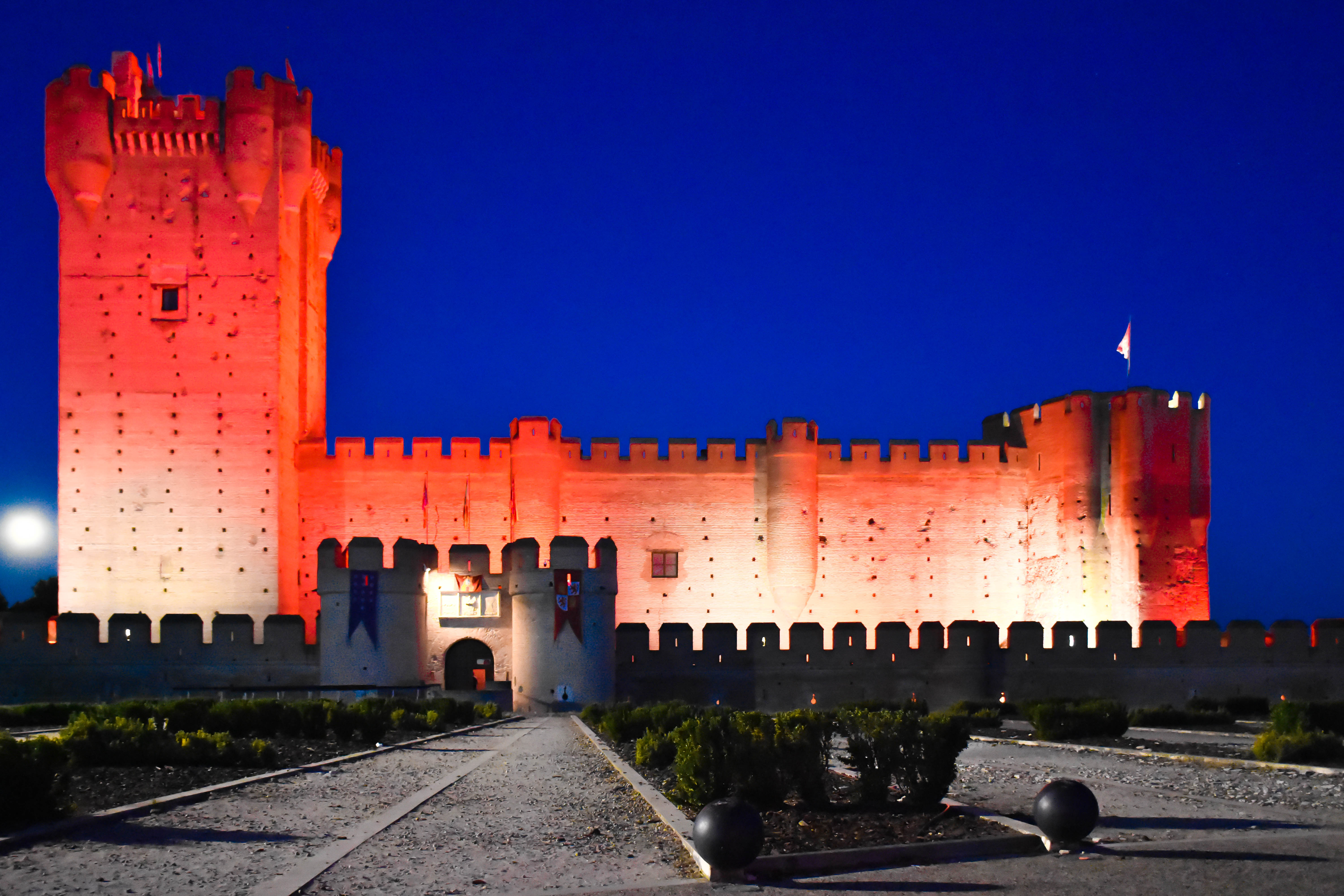 Castillo de la Mota - Noche